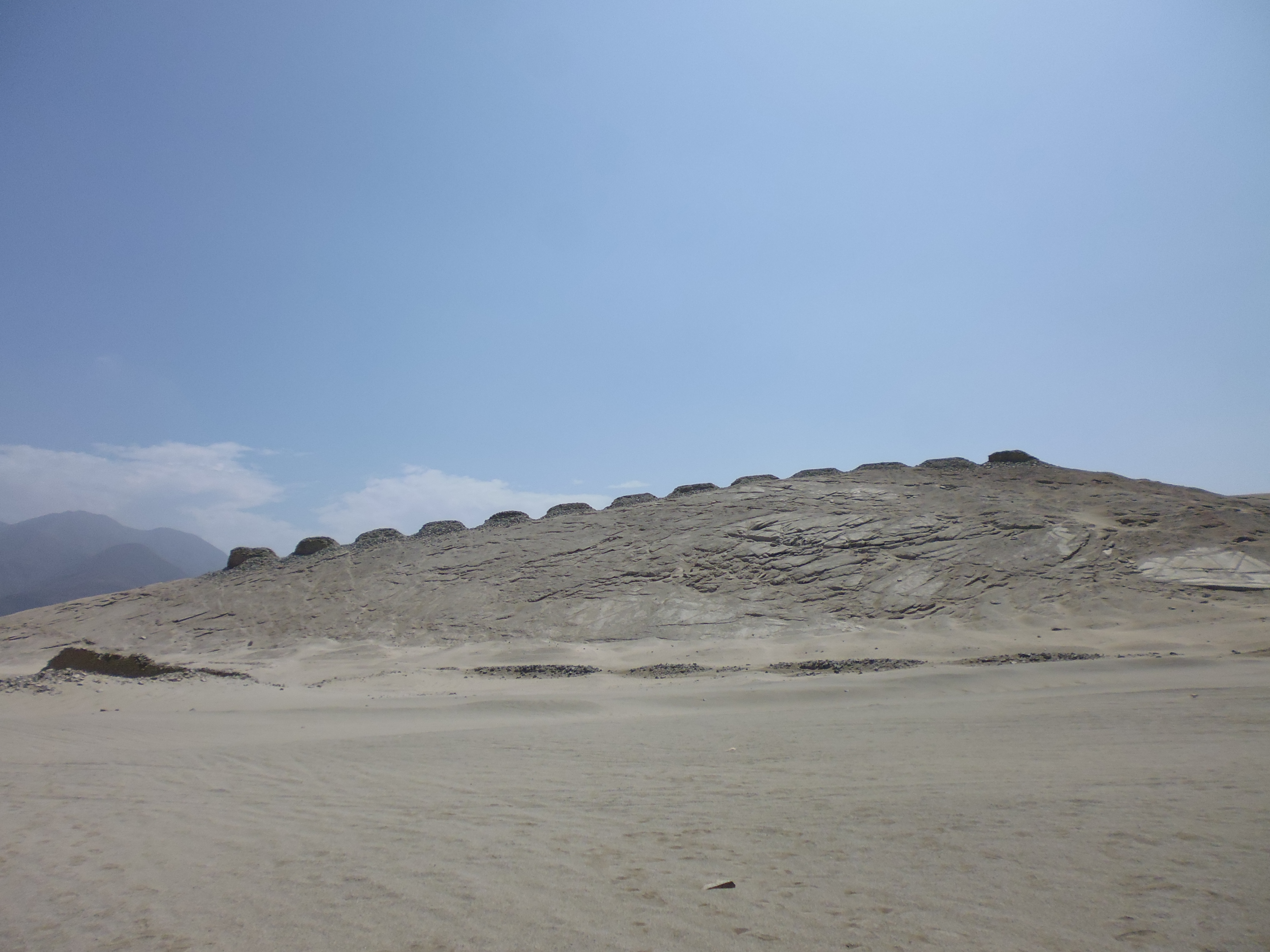 Vista panorámica de las trece torres del observatorio astronómico de Chankillo en Casma